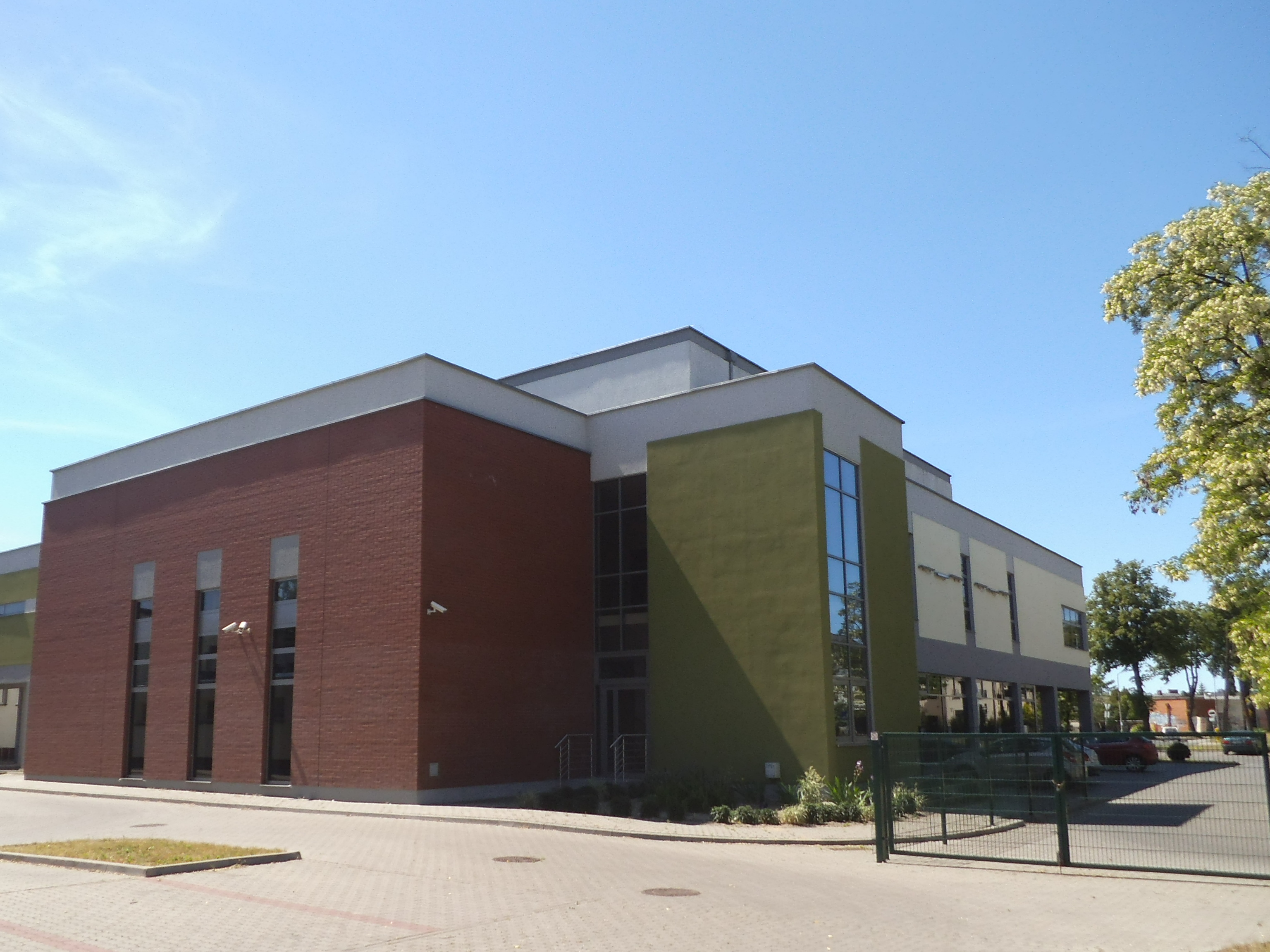 Sala koncertowa ZSM w Toruniu